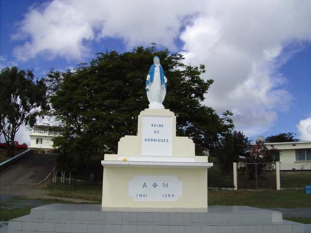 Statue de Marie, Reine de Rodrigues, à Pointe Canon, Rodrigues, République de Maurice.